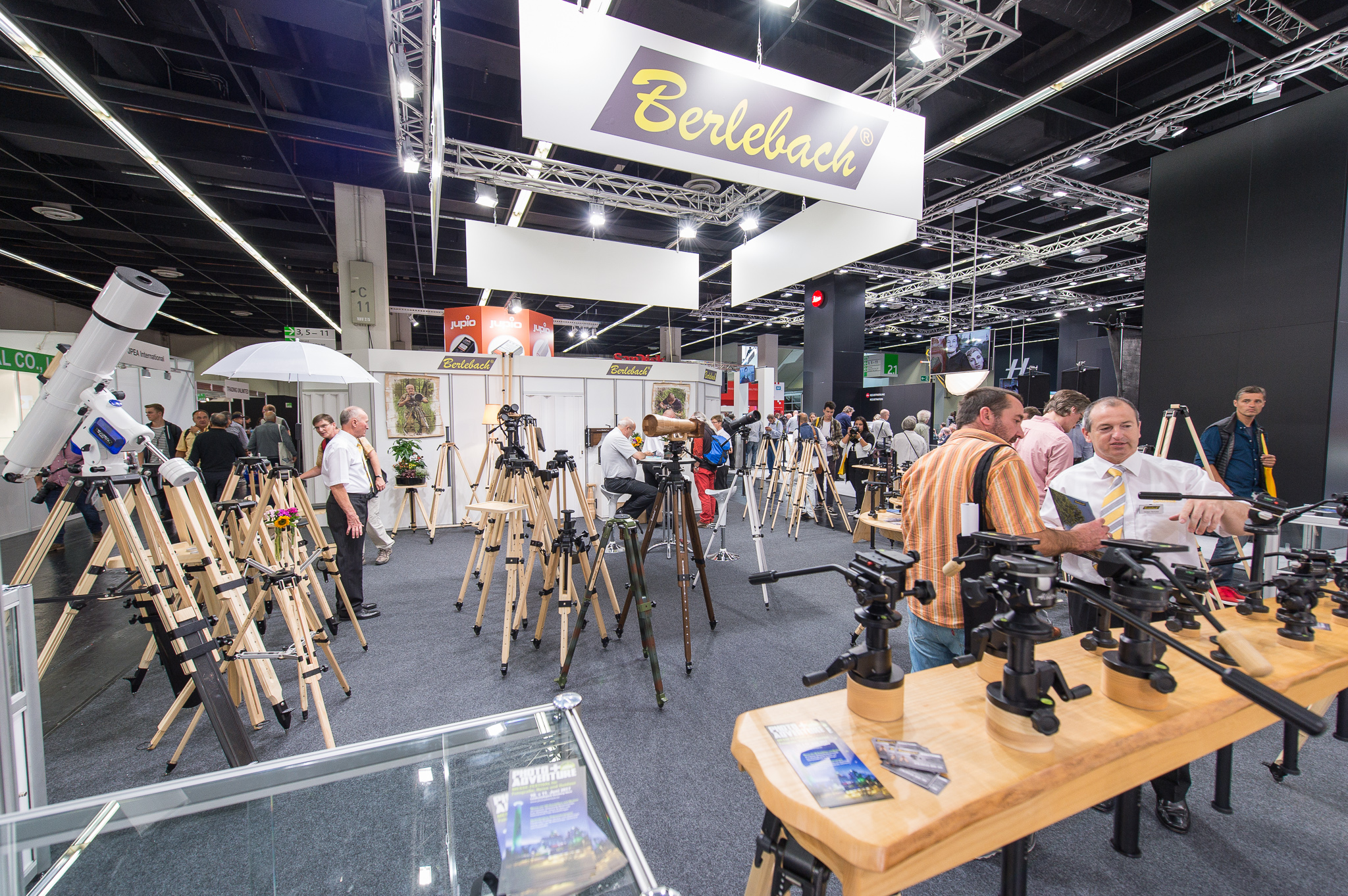 Berlebach, Kölnmesse, Photokina 2016